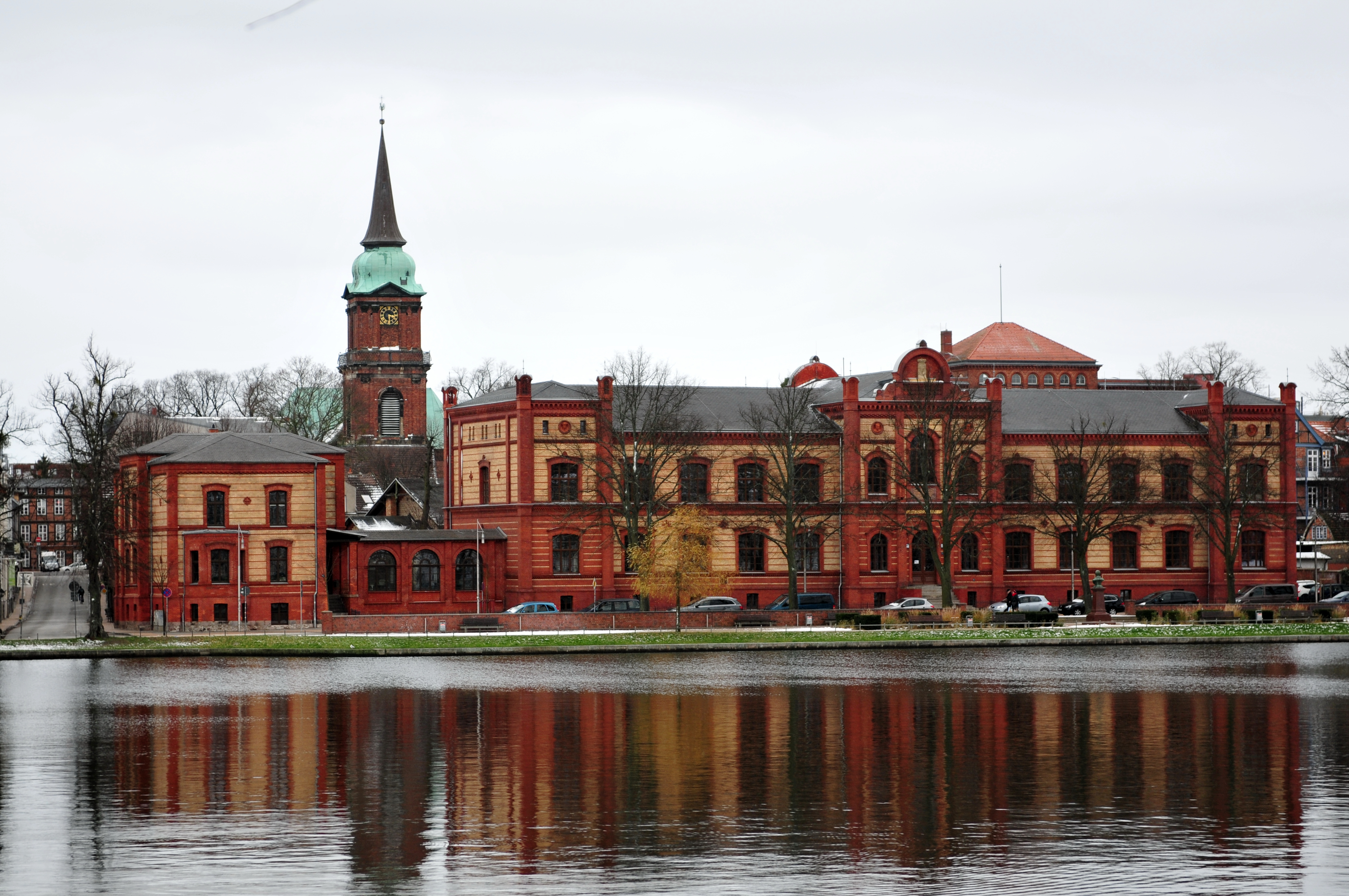 Schwerin, Blick über den Pfaffenteich mit ehemaligem Fridericianum und Schelfkirche